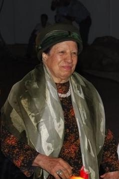 הרבנית ברכה קפאח